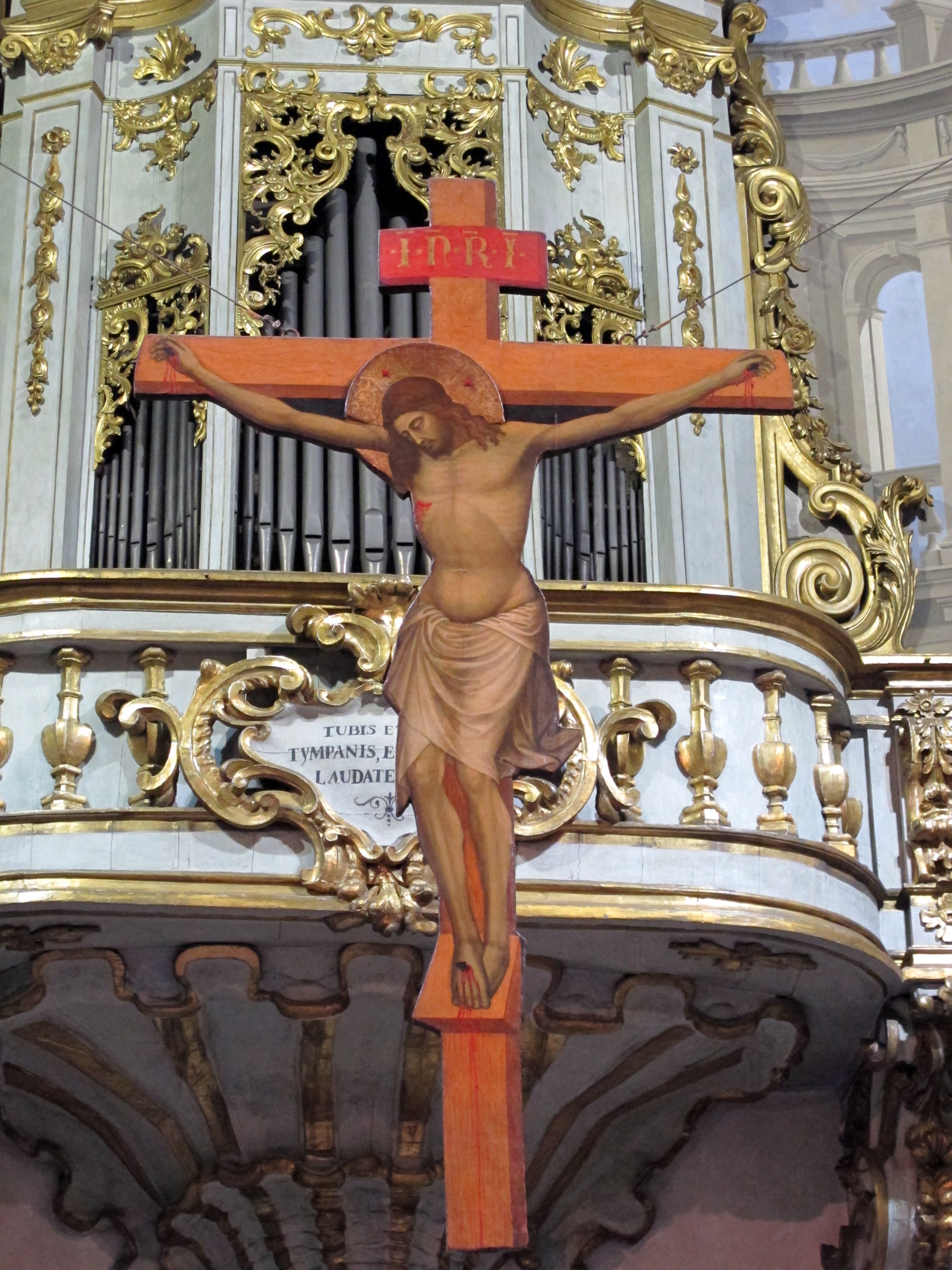 Chiesa di s. giuseppe, fi, croce del xv secolo